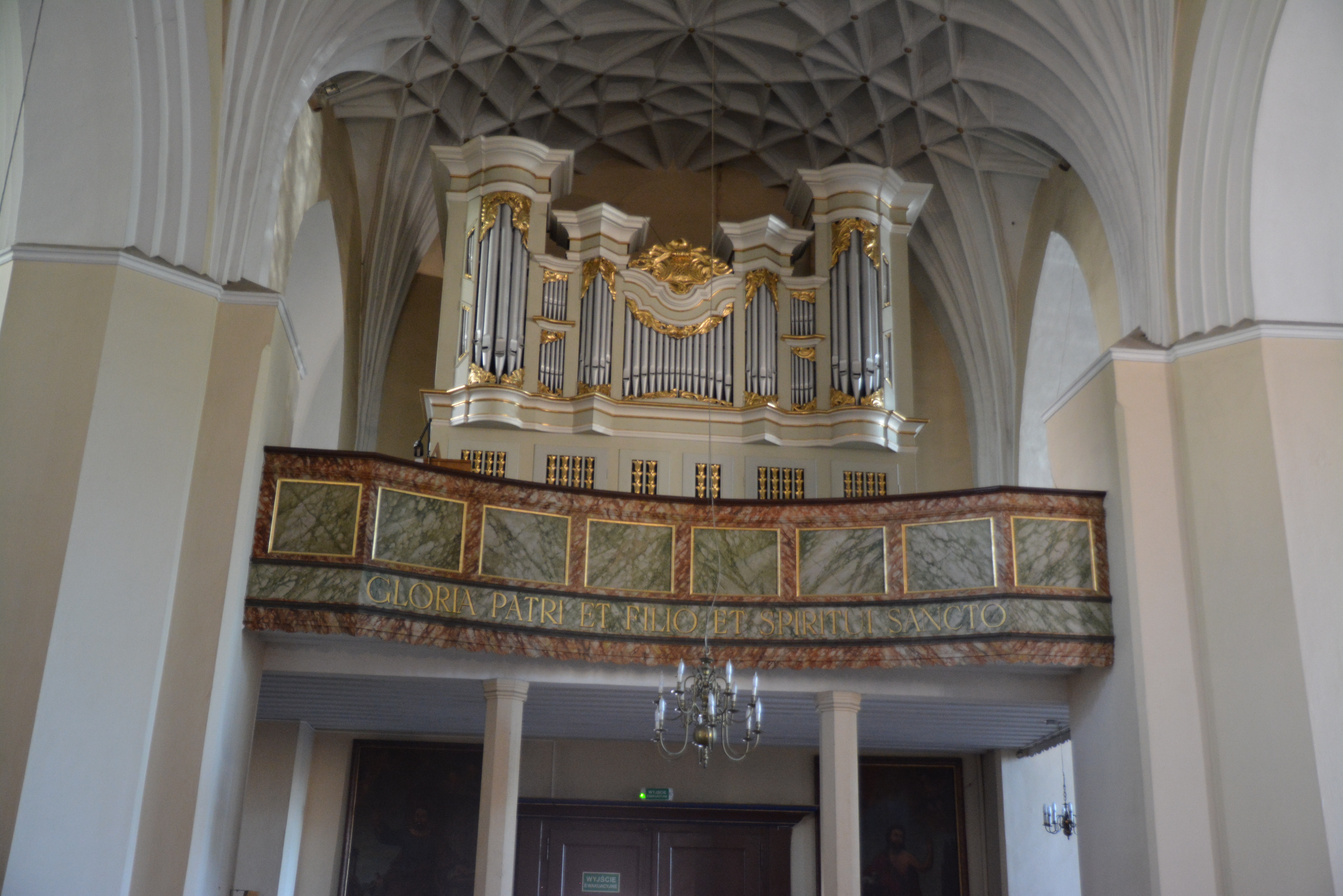 Kościół p.w. św. Michała Archanioła w Świebodzinie